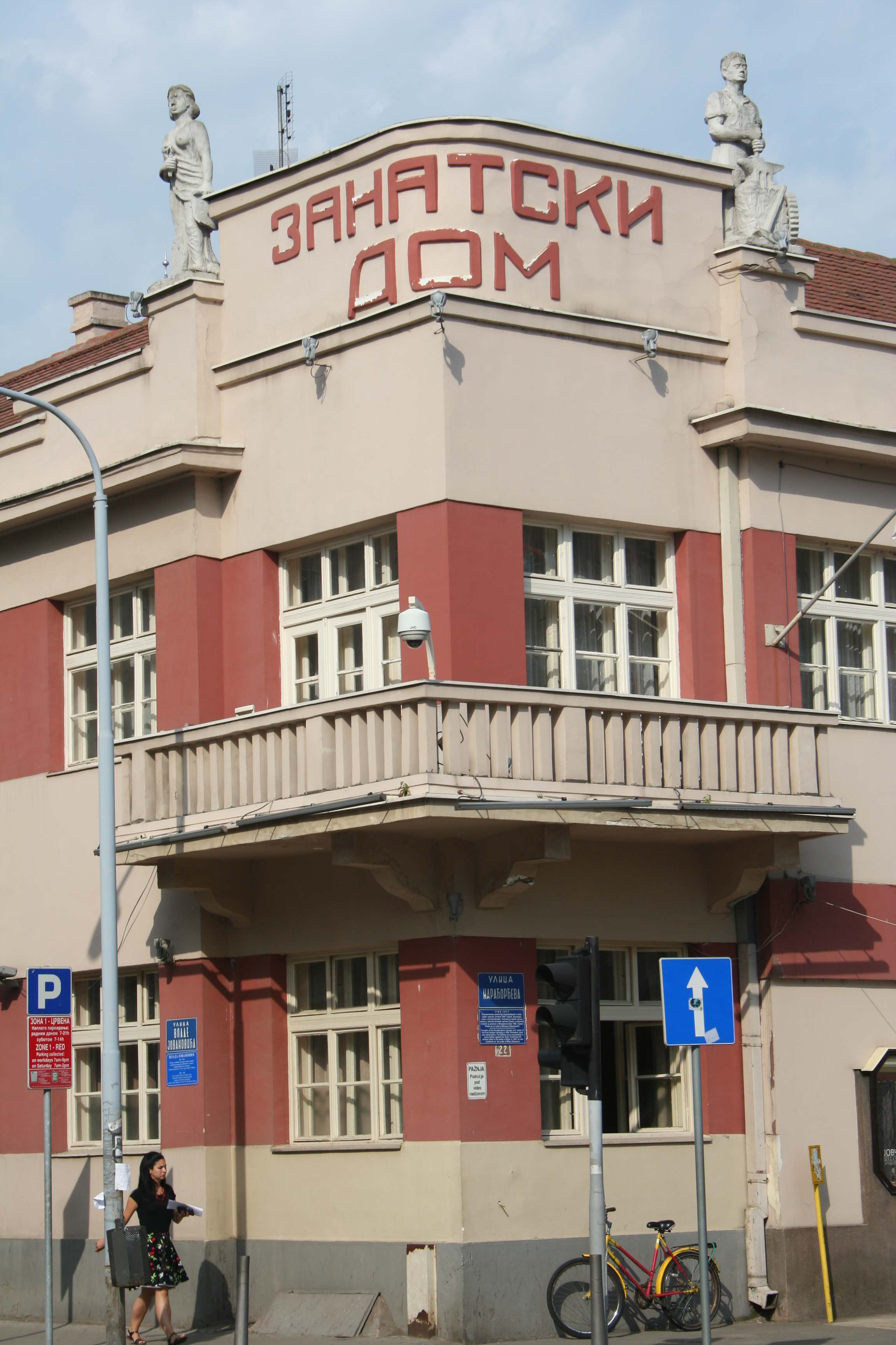 Zgrada pozorišta Šabac